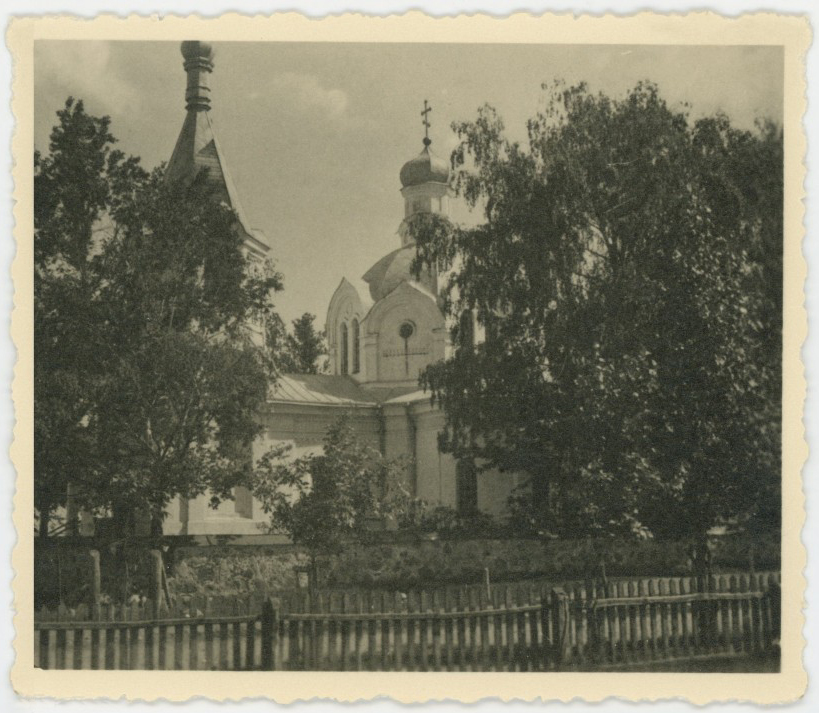 Беларуская (тарашкевіца): Даўгінаў (Daŭhinaŭ). Траецкая царква-мураўёўка